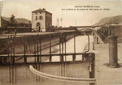 L'écluse de Sault-Brenaz (Ain) du canal de Jonage, au début du XXe siècle.